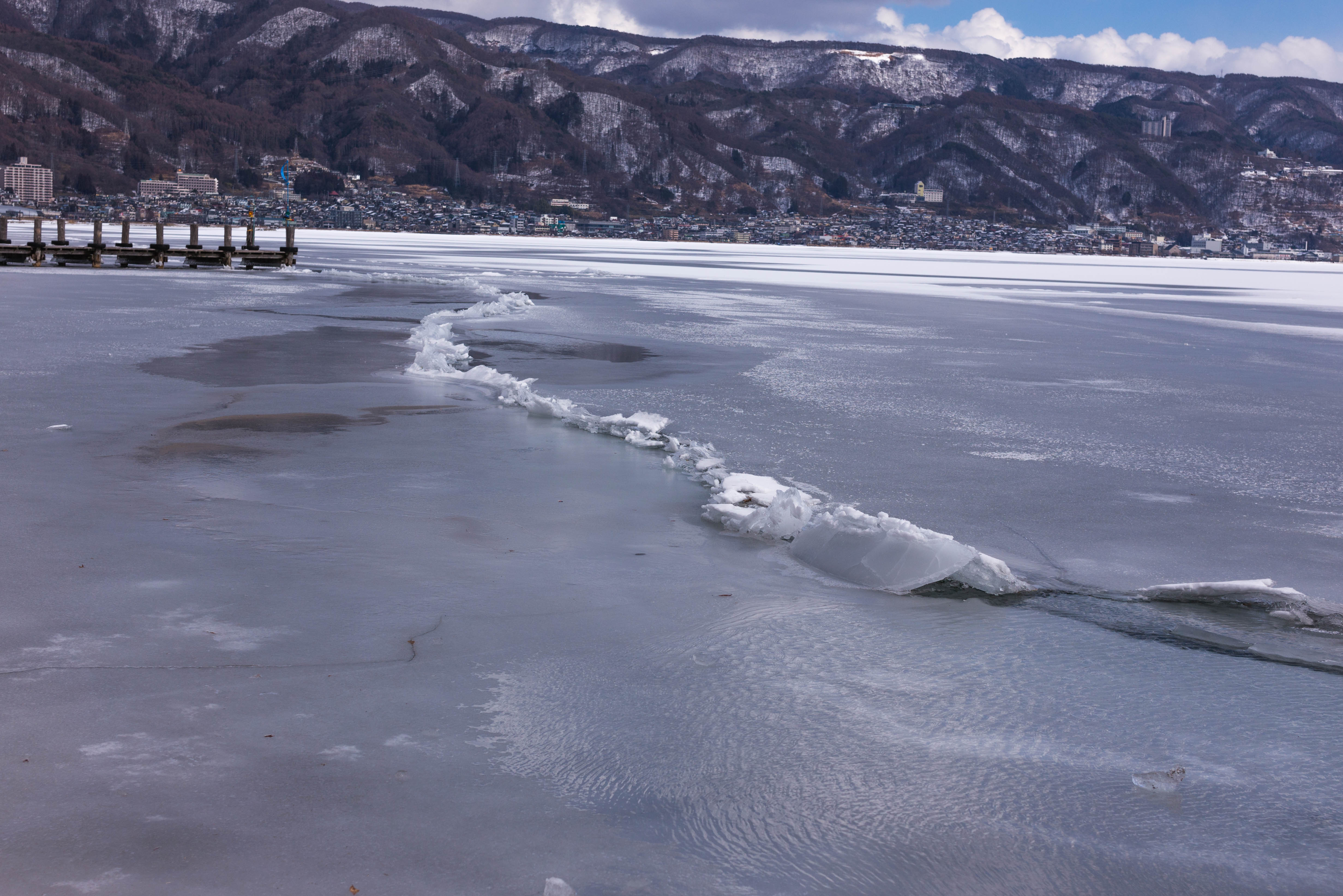 諏訪湖の「全面結氷」により、氷が寒暖差によりせり氷がせり上がる自然現象。 2018年に五季ぶりに出現す、これは一之御神渡り。